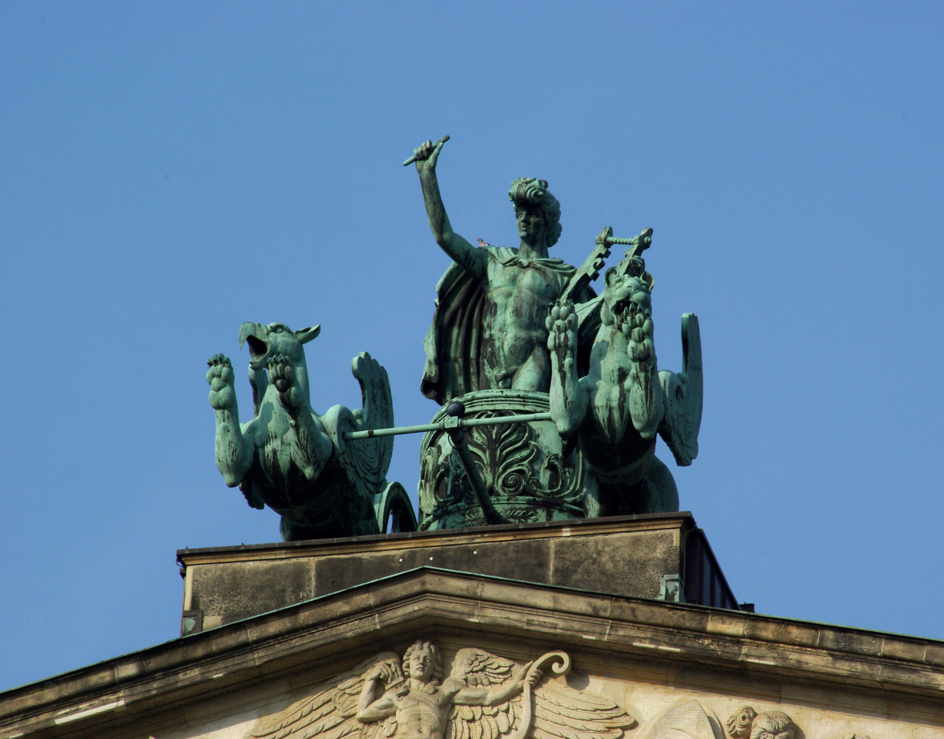 Berlin, Konzerthaus, Dachfigur: Apollo in einem von Greifen gezogenen Wagen